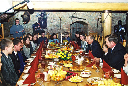 КРАСНОЯРСК. Встреча с воспитанниками семейного детского дома Колесниковых. город Красноярск, кафе «Старый замок»